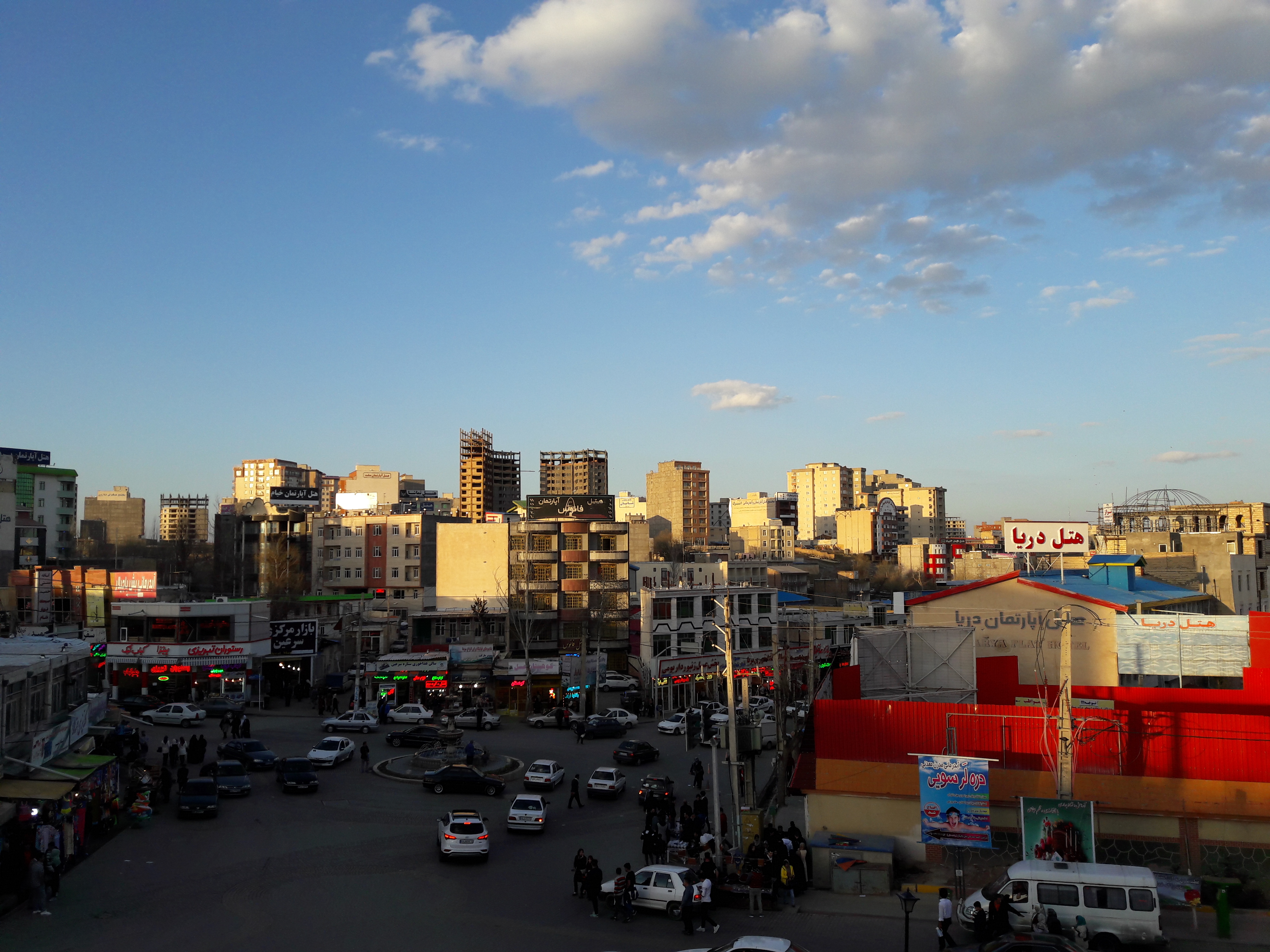 سرعین شهر چشمه های جوشان